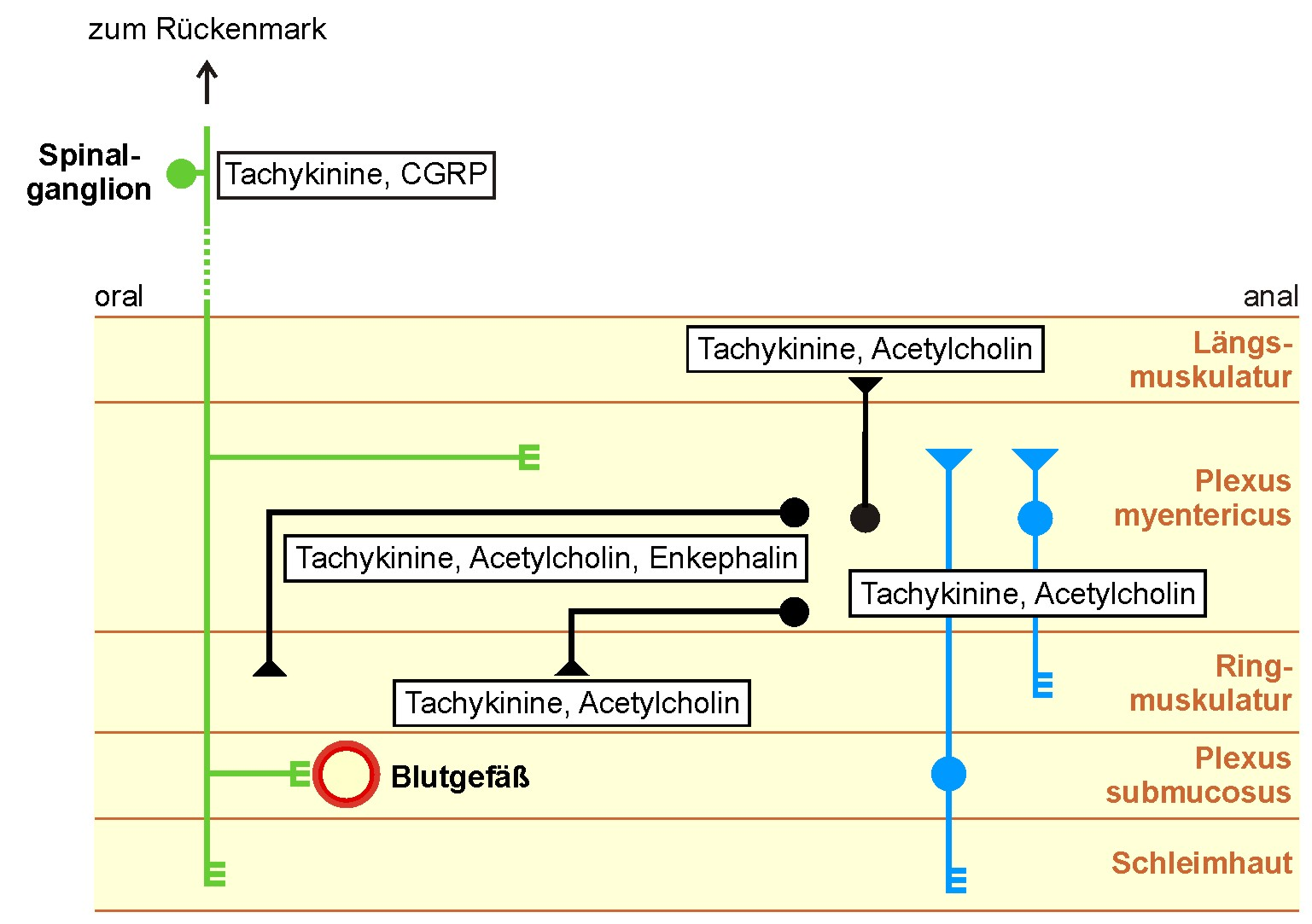 Schema von Neuronen mit Tachykininen und anderen Transmittern im Darmnervensystem